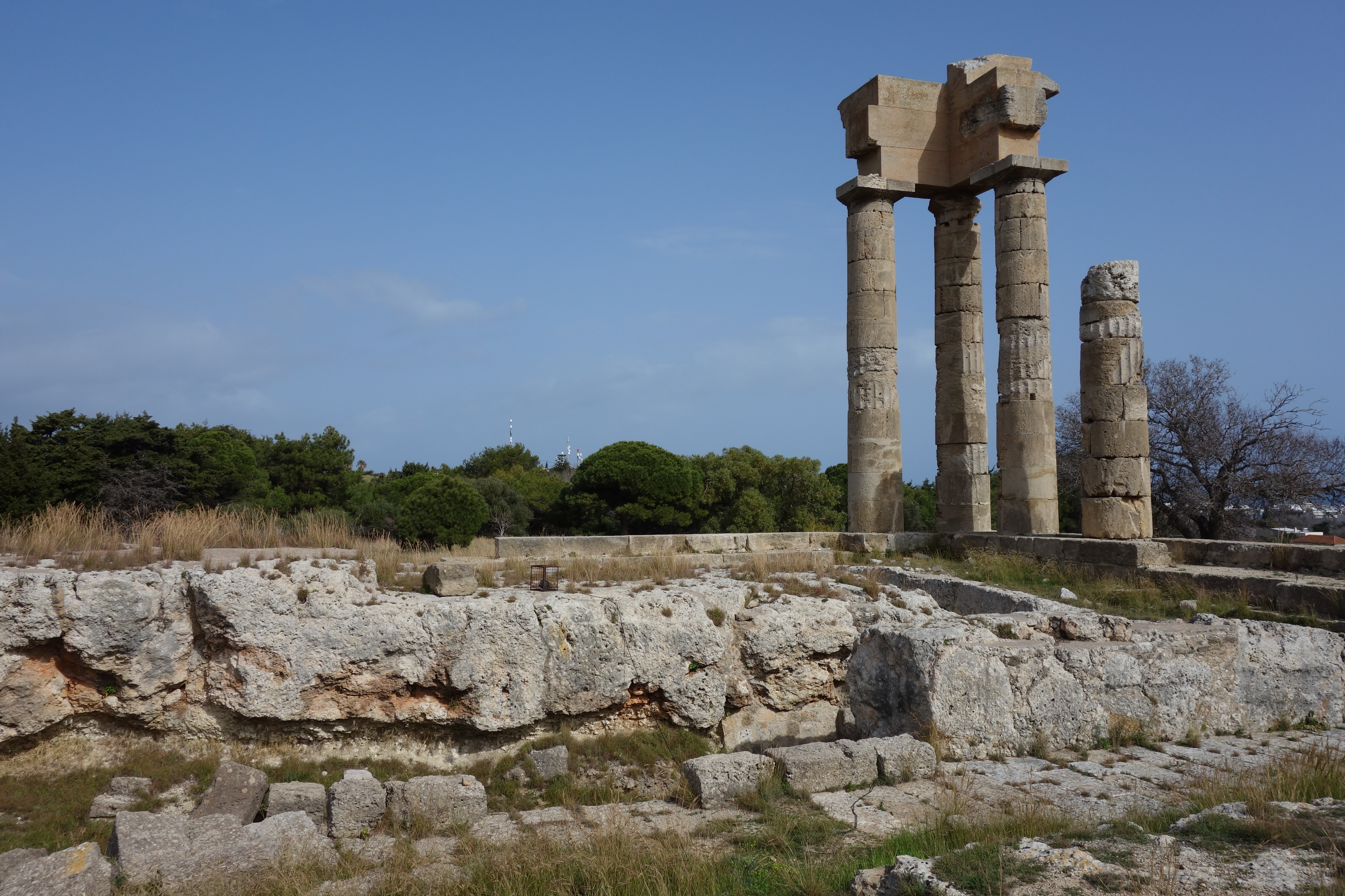 ロドス・タウンのスミス山にあるアクロポリス